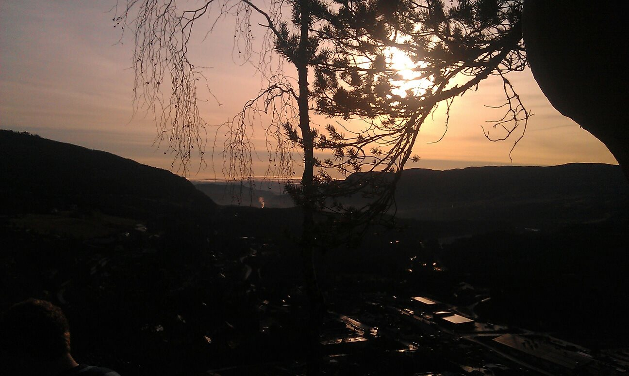 Solnedgang fra Bergflagget i Leira, Valdres